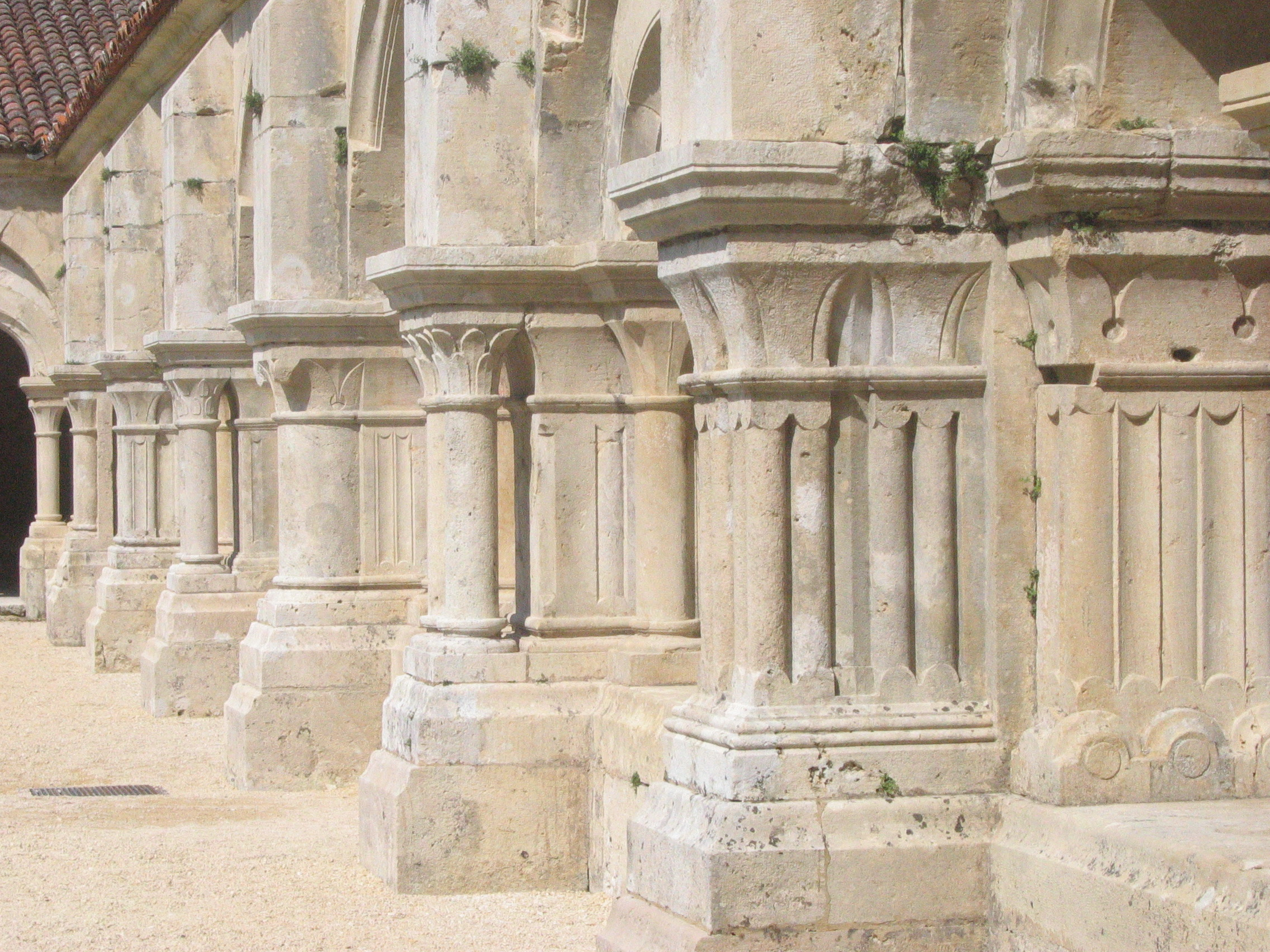 Abbaye de Fontenay, France : cloître.